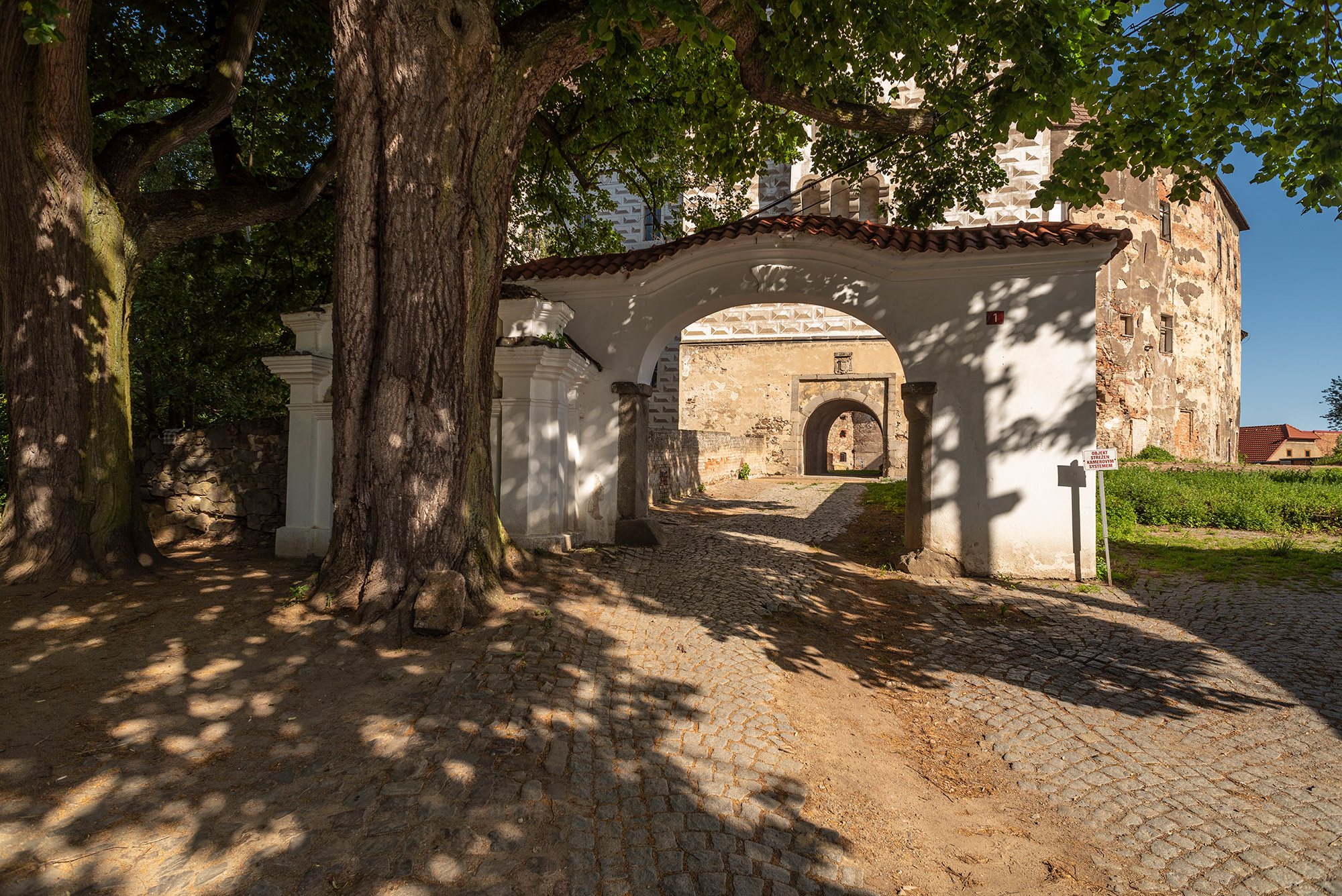 Zámek Rožmitál pod Třemšínem